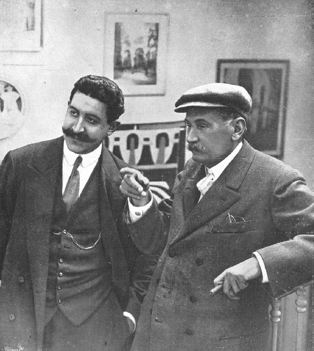 Fotografía que muestra al periodista de La Esfera José María Carretero entrevistando en su casa al escritor español Benito Pérez Galdós